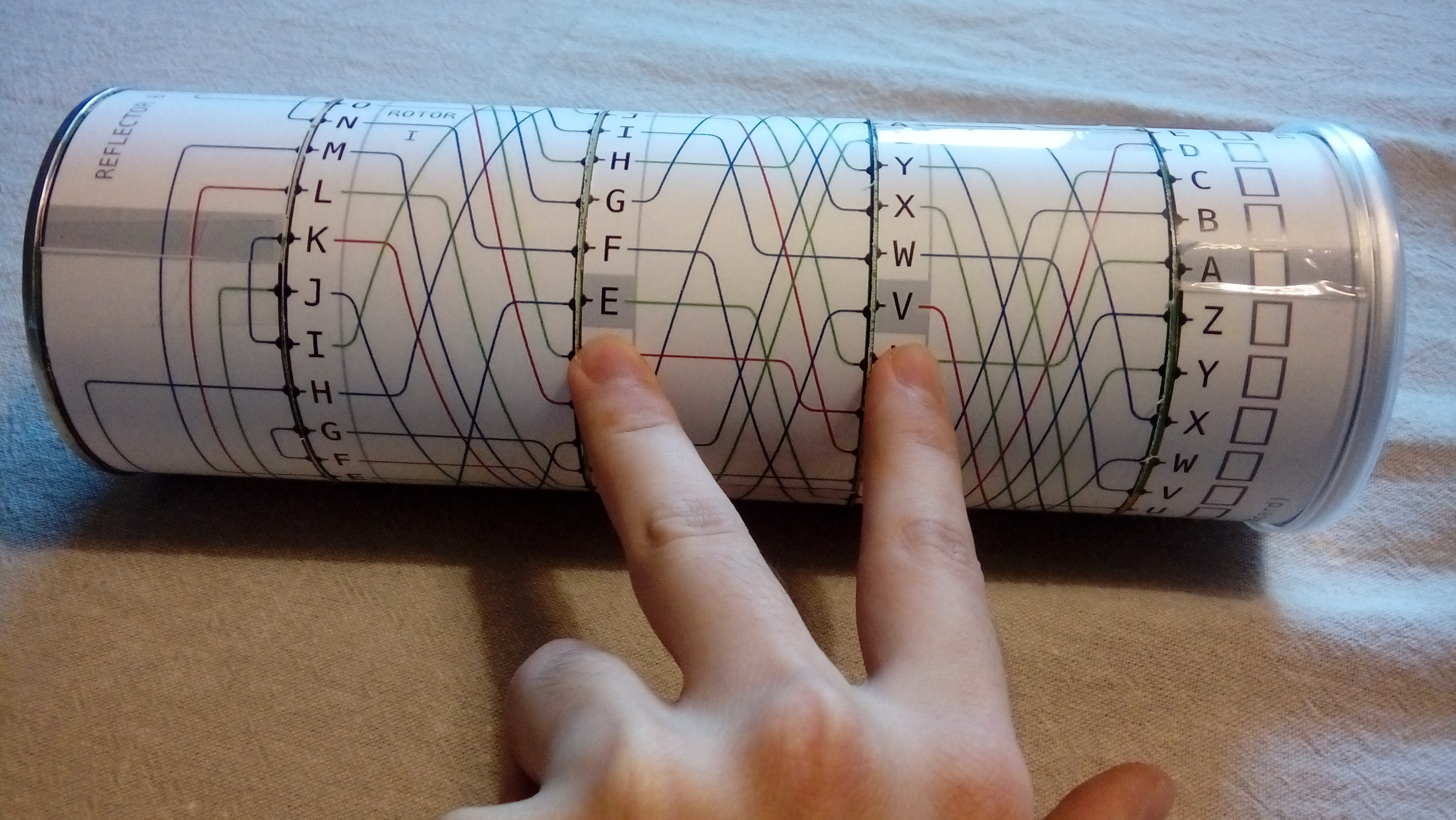 aggba